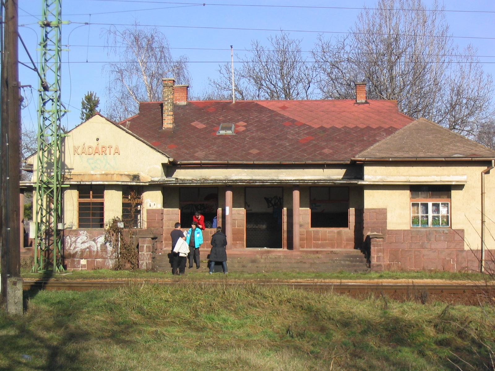 Kádárta, vasútállomás